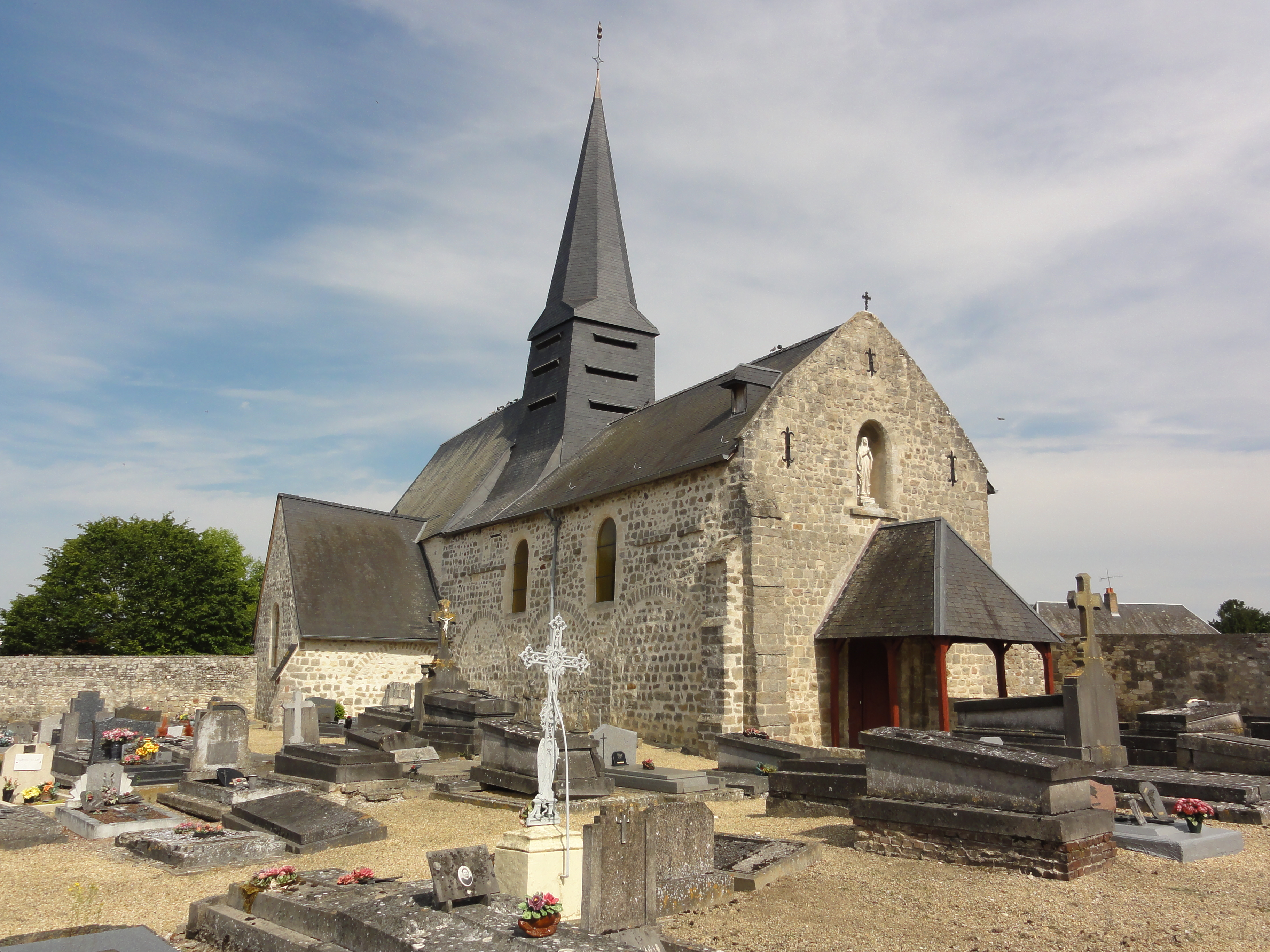 Gizy (Aisne) église